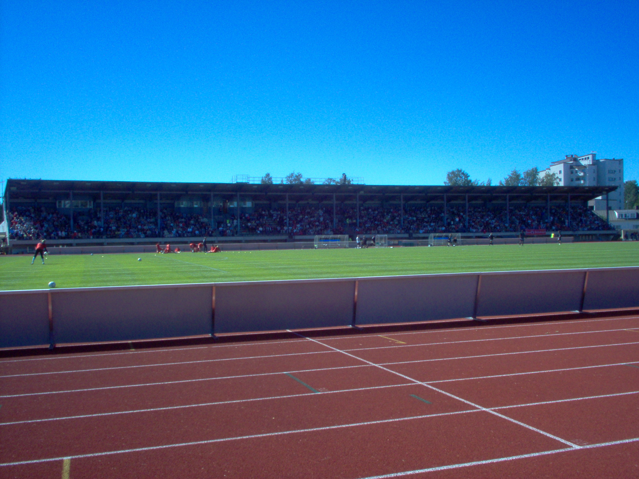 Pietarsaaren keskuskenttä